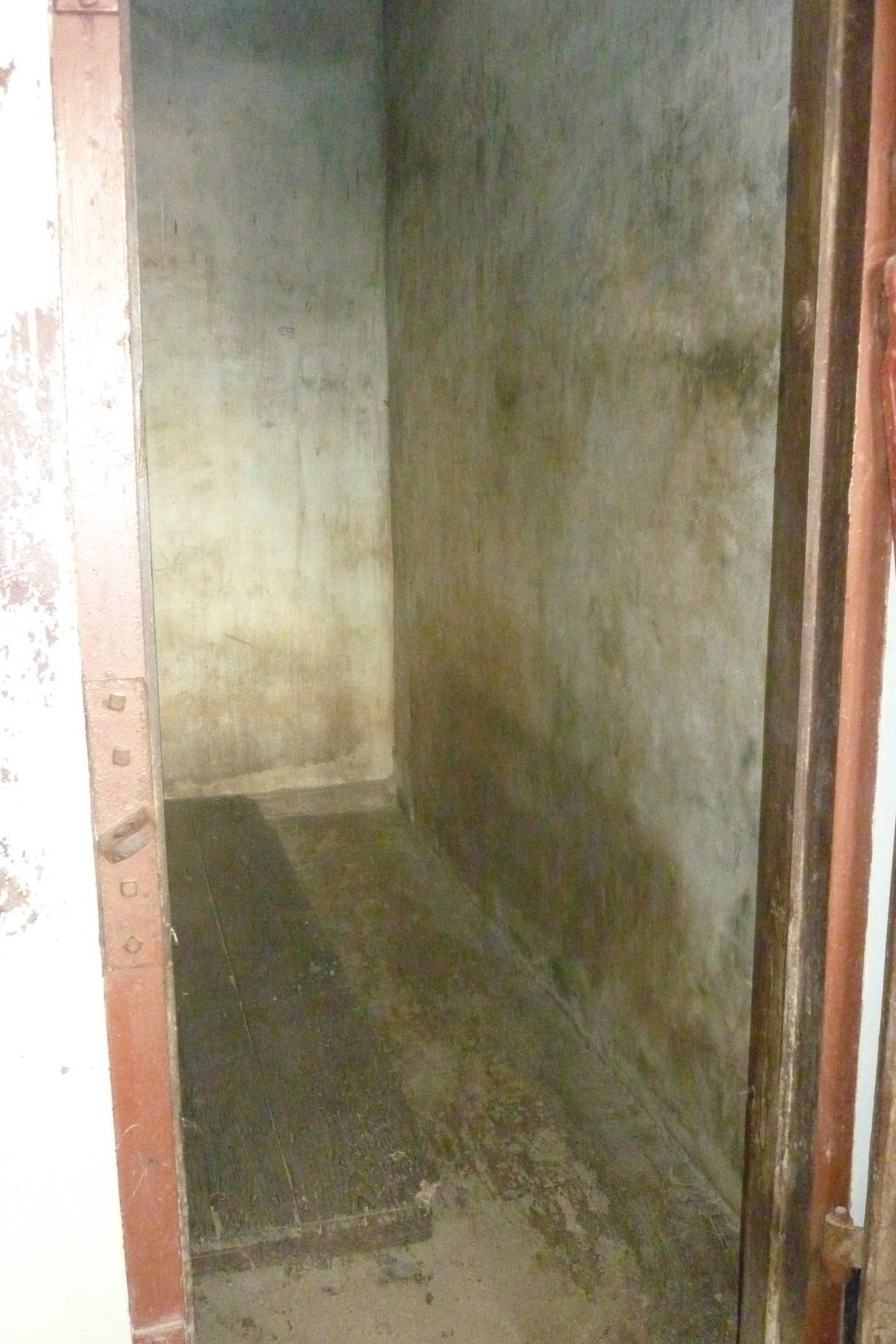 Fort Nieuw-Amsterdam, isoleercel